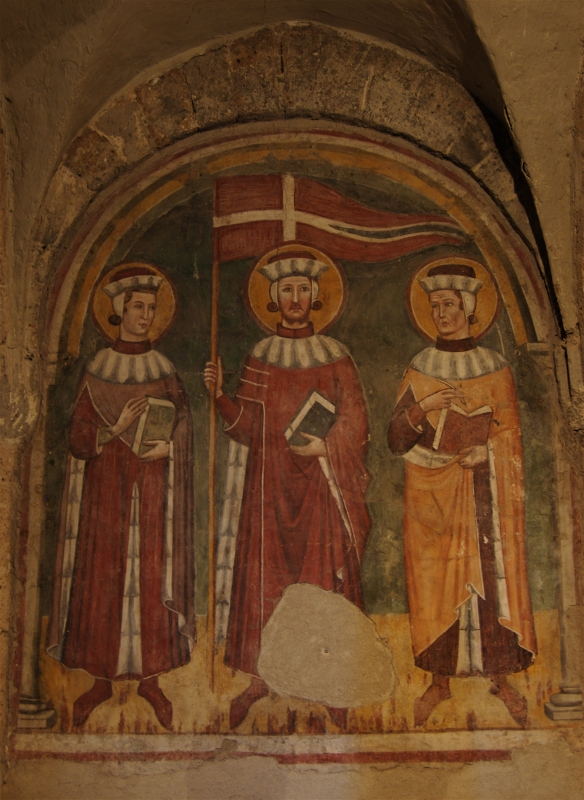 Affresco del XIV secolo rappresentante i santi protettori di Tuscania. (Fotografia scattata da campaz, con il permesso della persone che custodisce la chiesa)